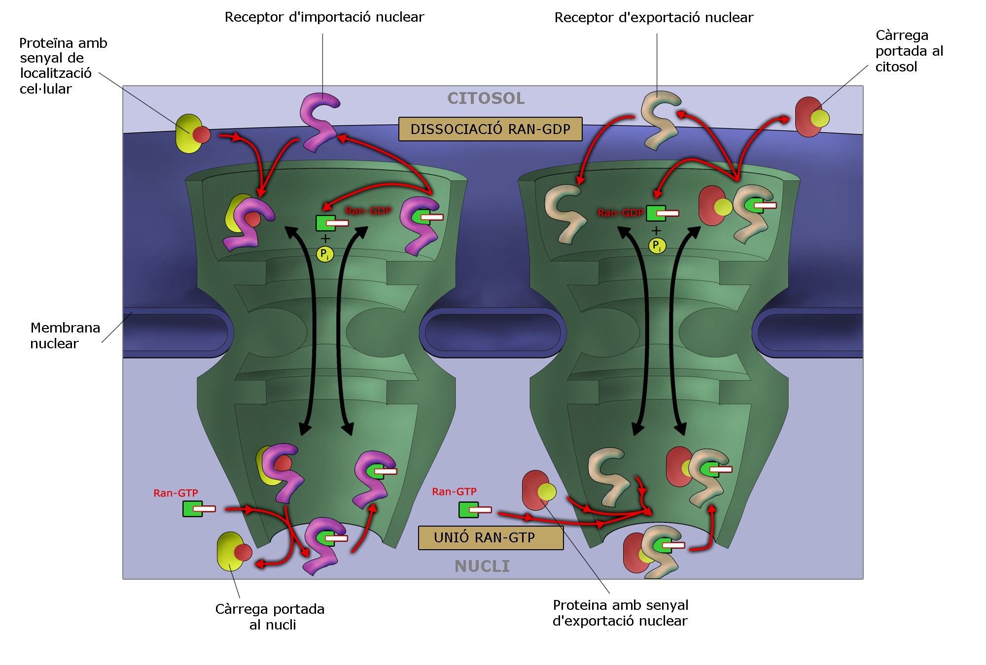 Esquema del funcionament del complex RanGTP en el transport nuclear.